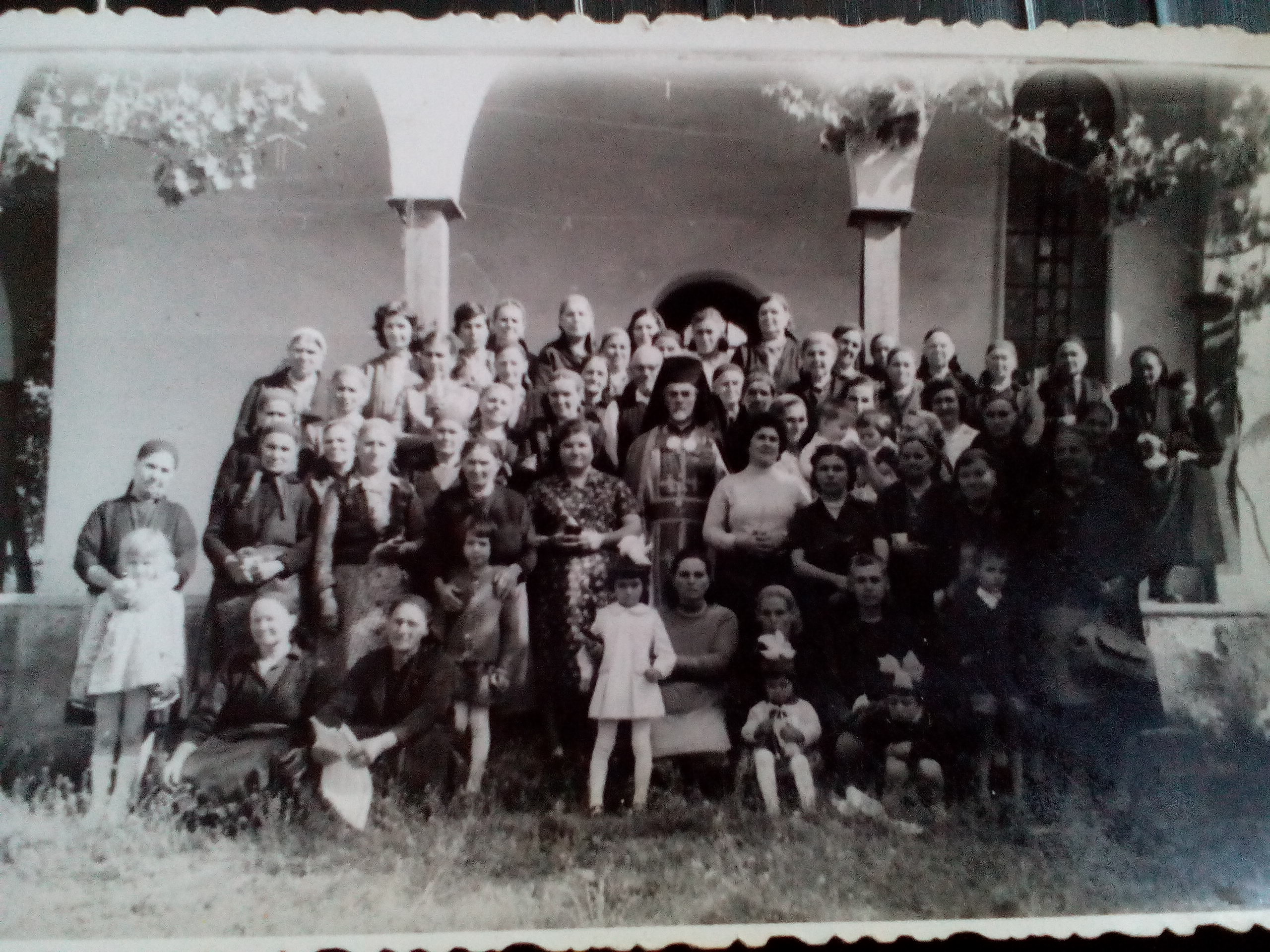 Отец Морски и миряни пред църквата.